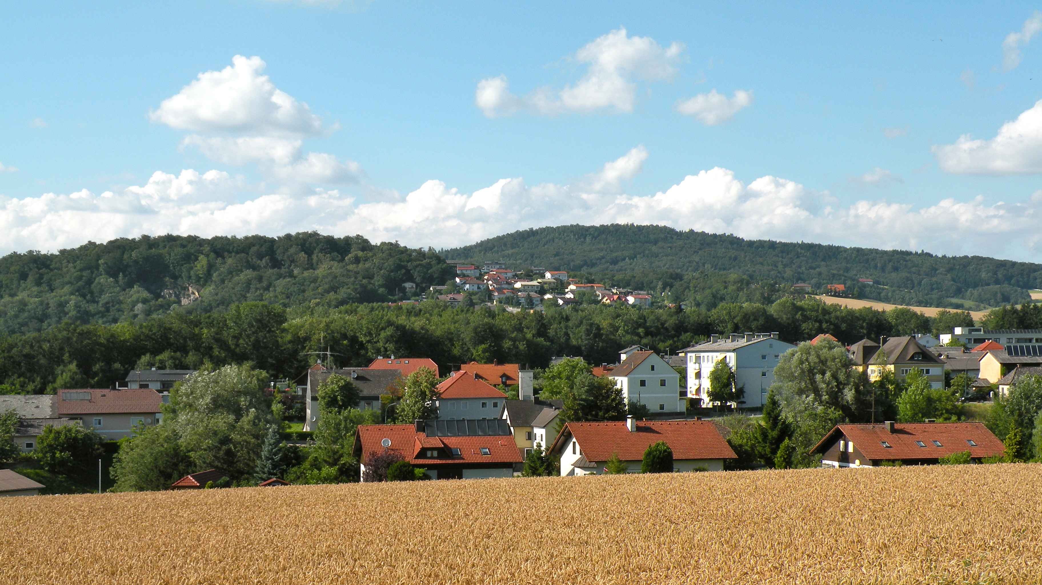 Ortschaft Luftenberg an der Donau